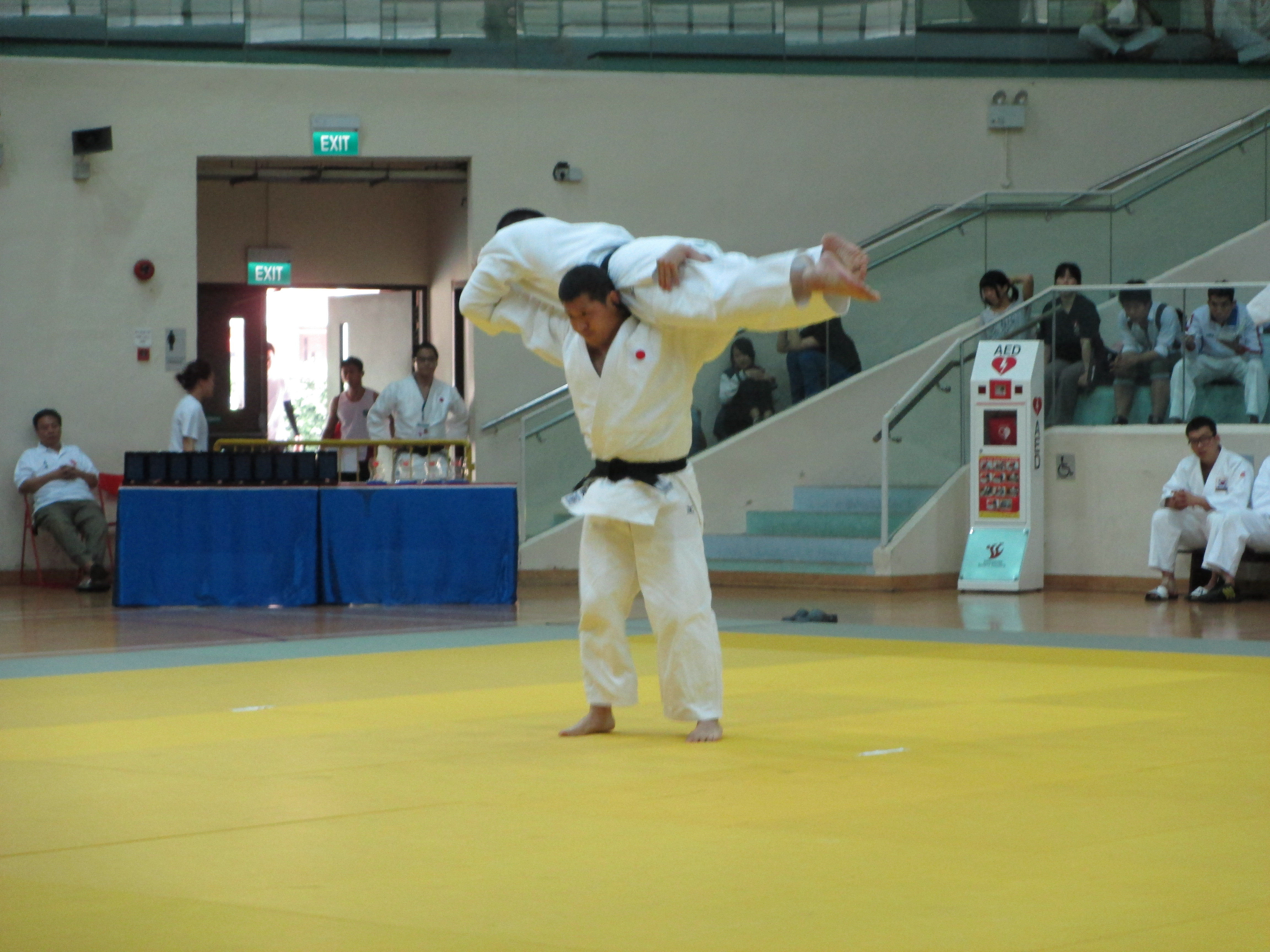 アジア形選手権大会で